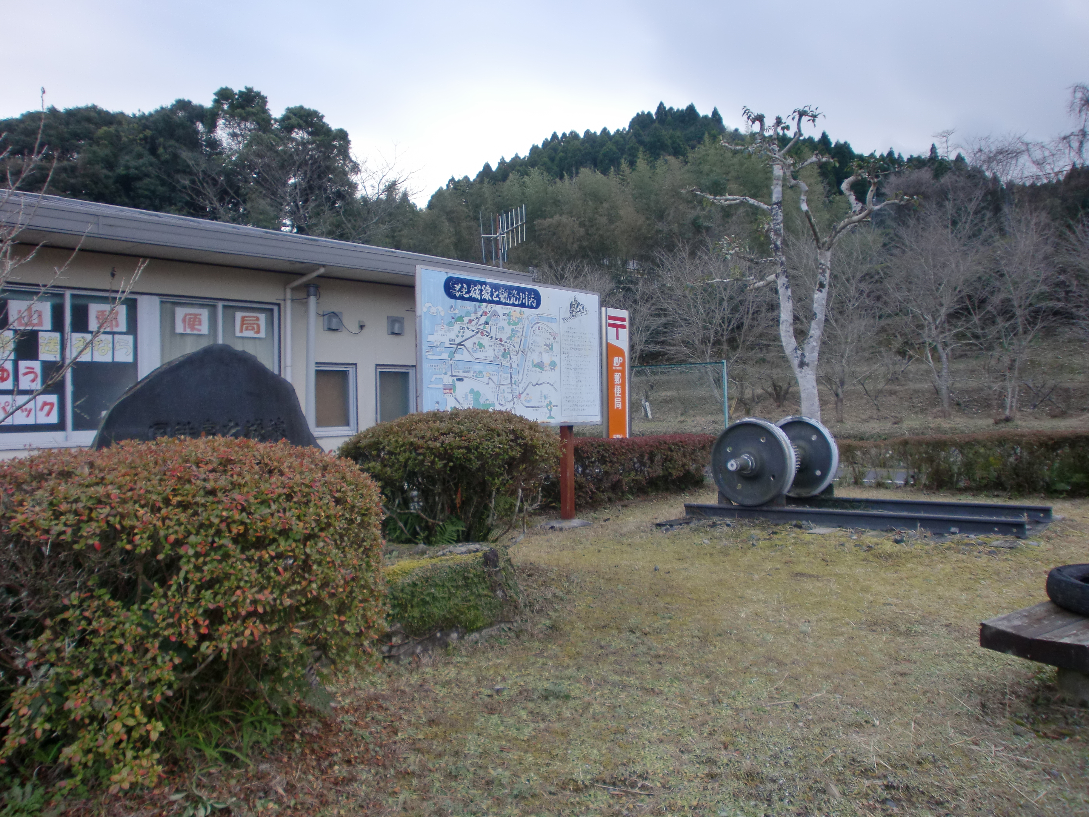 吉野山駅（宮之城線）の駅跡にある記念碑と動輪。隣接している吉野山郵便局の中には、宮之城線廃止前の当時の写真が展示してある。